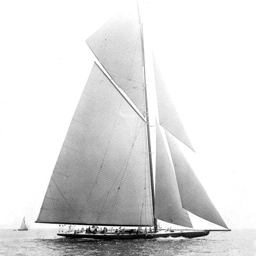 1914 - Shamrock IV - Charles E - Nicholson - Photo Agence Rol - Vignette carrée